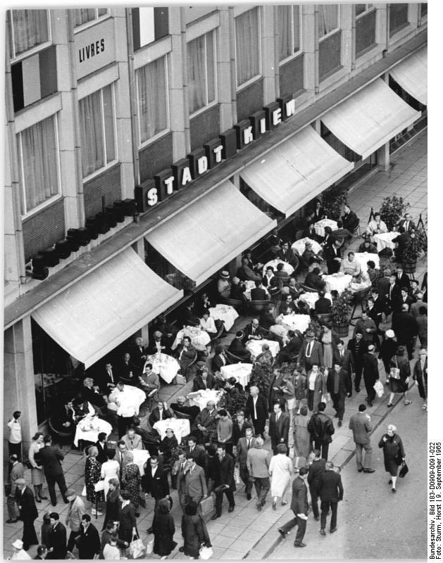 Leipzig, Petersstraße, Straßencafé Zentralbild Sturm 9.9.1965 Leipziger Herbstmesse 1965 In- und ausländische Messegäste im Restaurant "Kiew" (Neues Messehaus) in der Petersstraße.